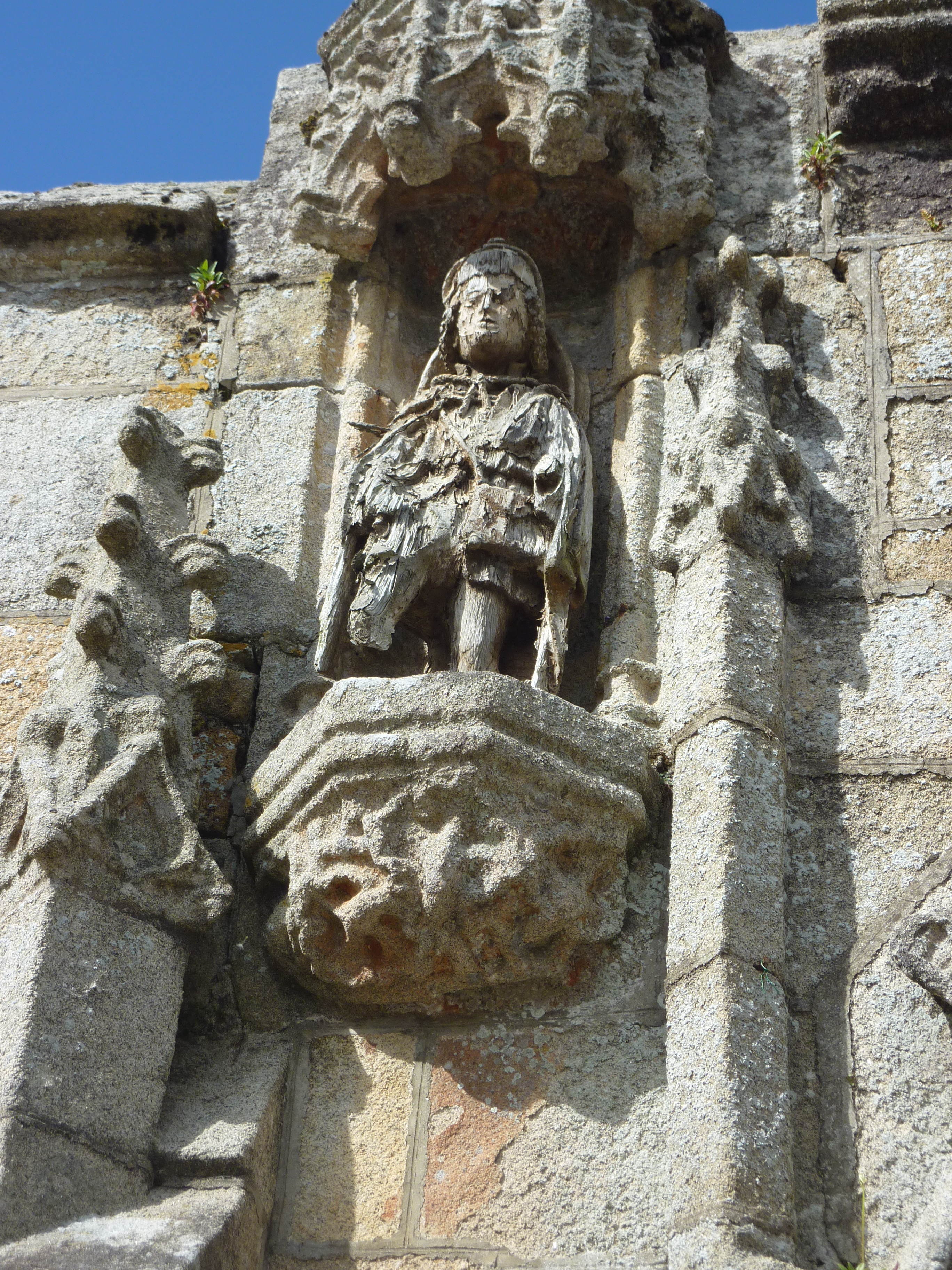 Saint-Jean-du-Doigt : arc de triomphe, statue de Saint-Roch, en bois, très abîmée.